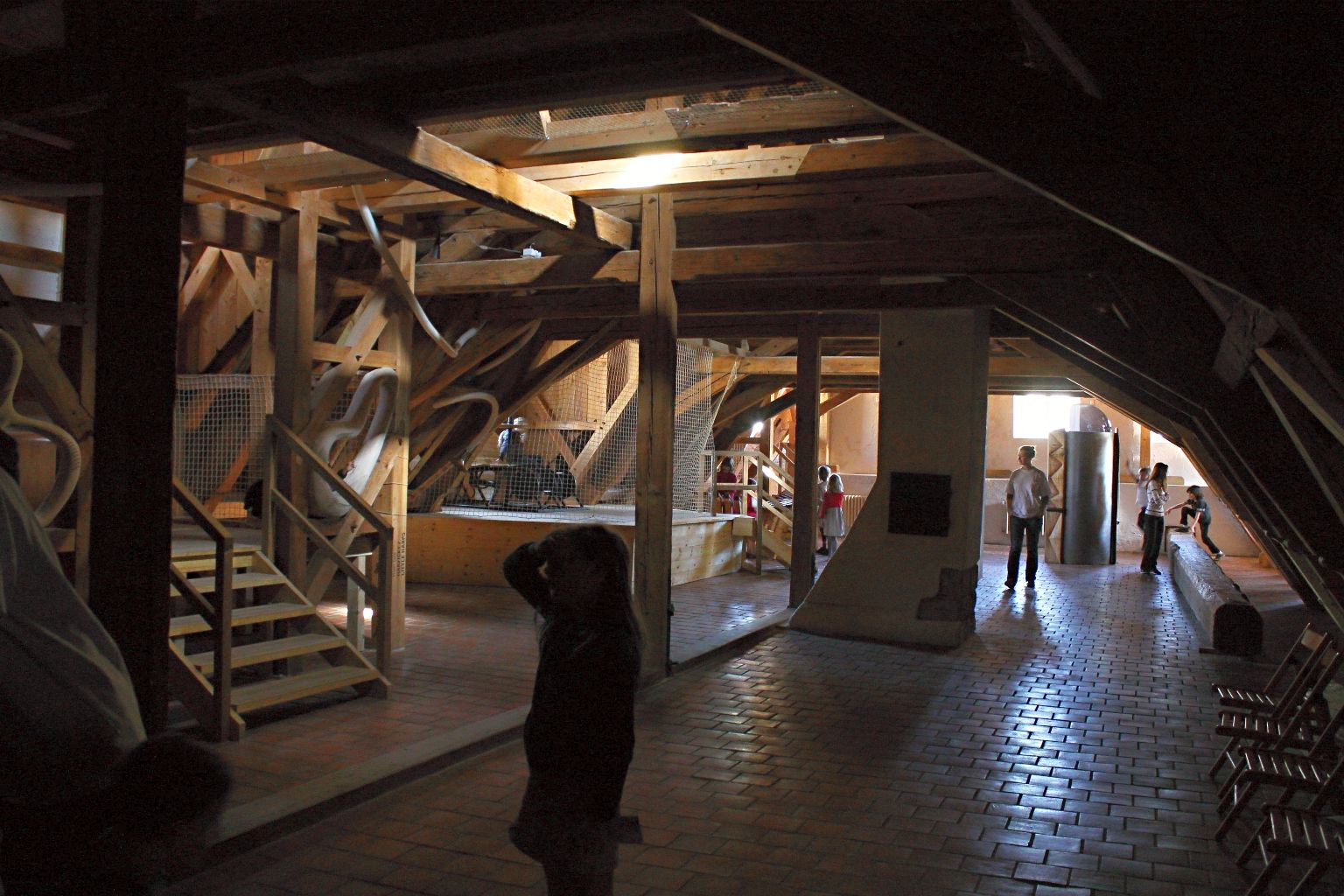 Vikýře PLAY v Malostranské besedě - pohled do expozice v půdních prostorách.